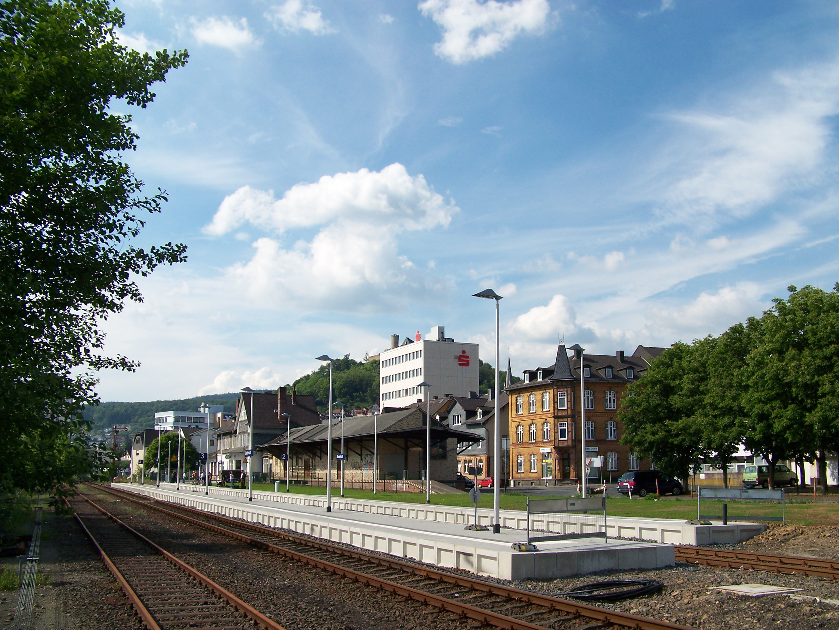 Bahnhofgebäude von Biedenkopf